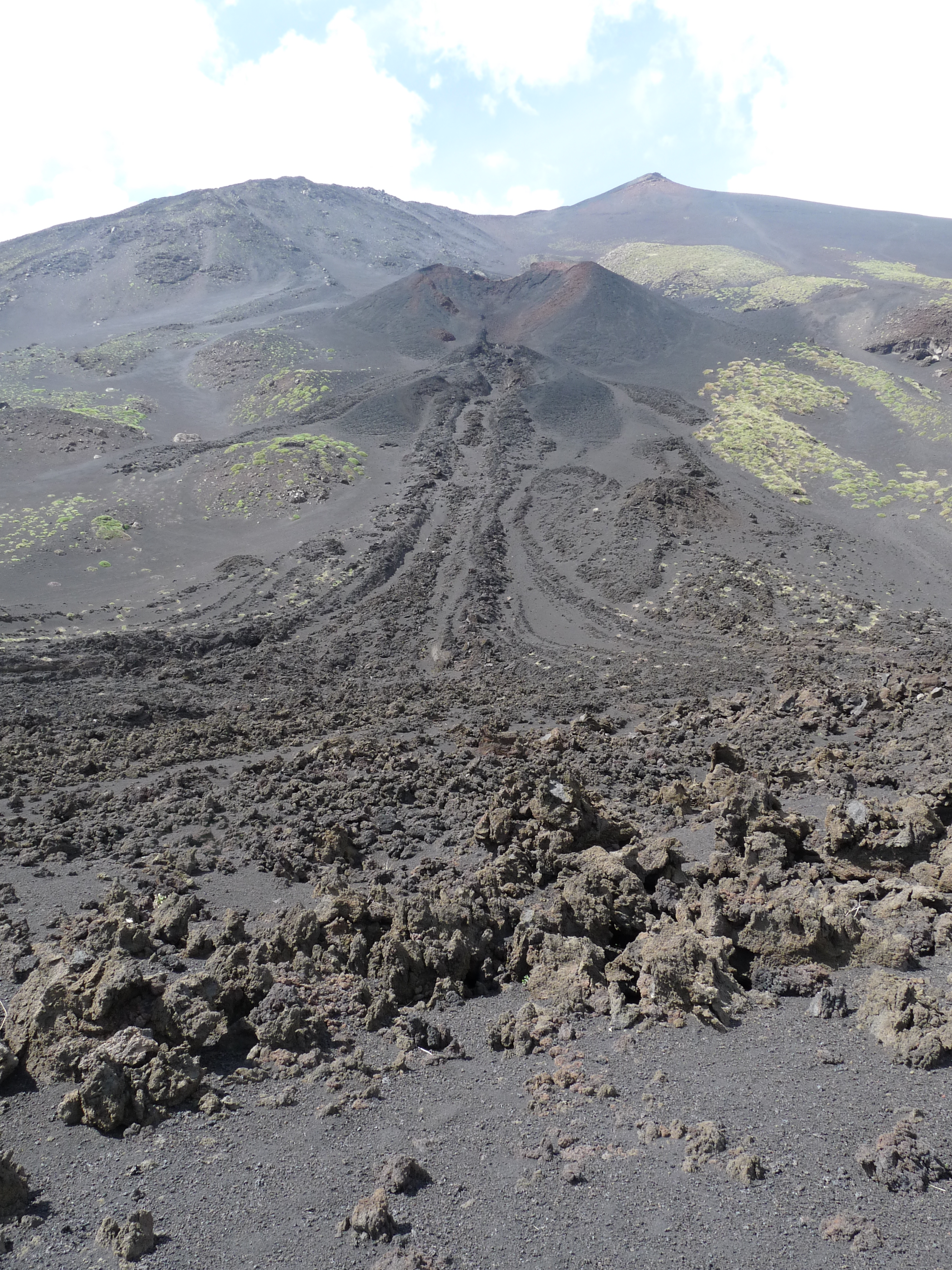 Fissure et coulée de lave de juillet 2001 sur le versant Sud de l'Etna (La Montagnola)